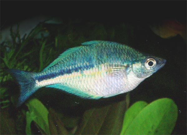 Melanotaenia lacustris - Kutubu-See-Regenbogenfisch im Aquarium